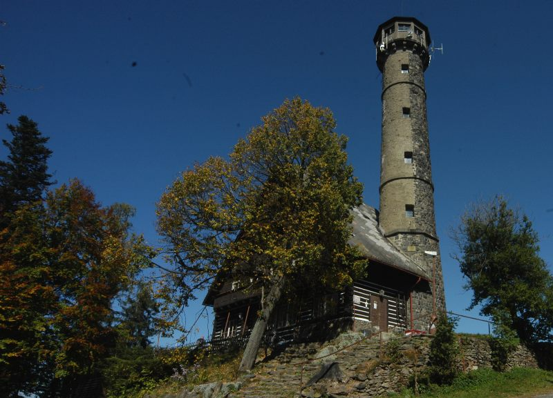 Aussichtswarte des KCT auf dem Berg Svatobor bei Susice